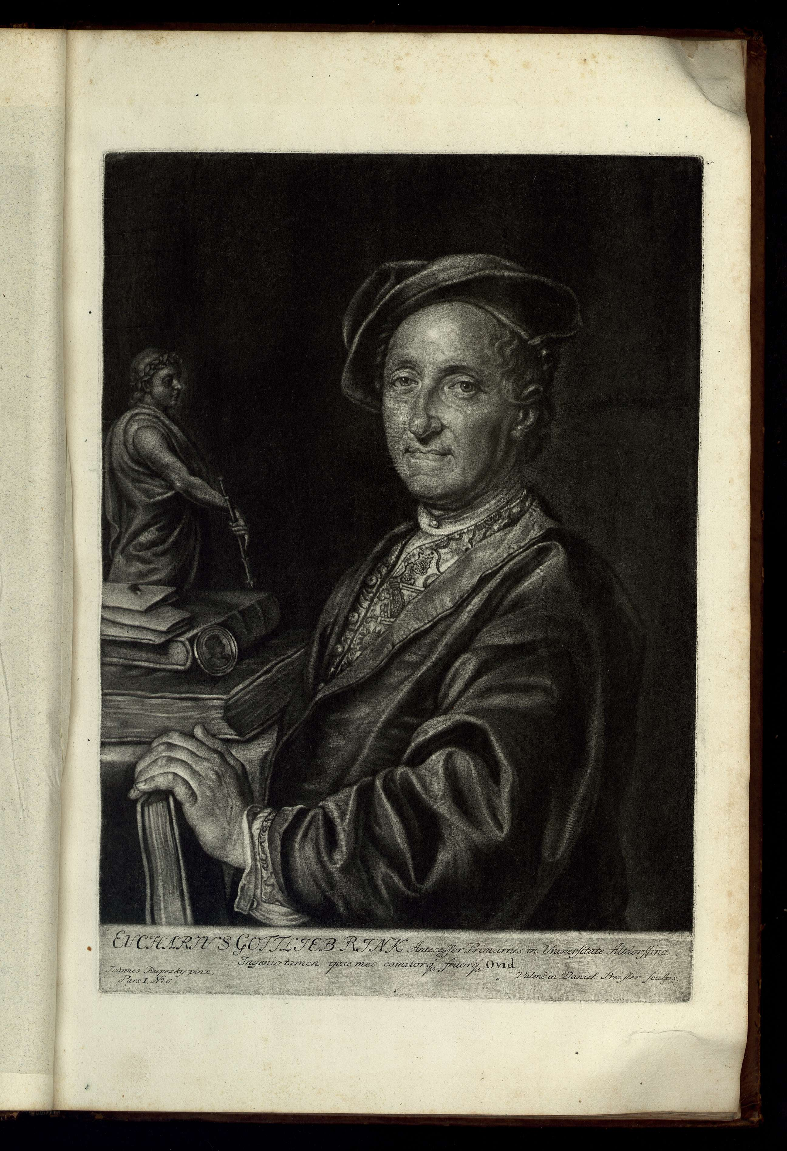 Euchr. Gottl. Rinok, Prof. P. Altdorf Eucharius Gottlieb Rink (1670-1745), deutscher Heraldiker und Jurist. Kupferstiche von Bernhard Vogel, nach Gemälden von Johann Kupetzky. Herausgegeben Nürnberg 1745.